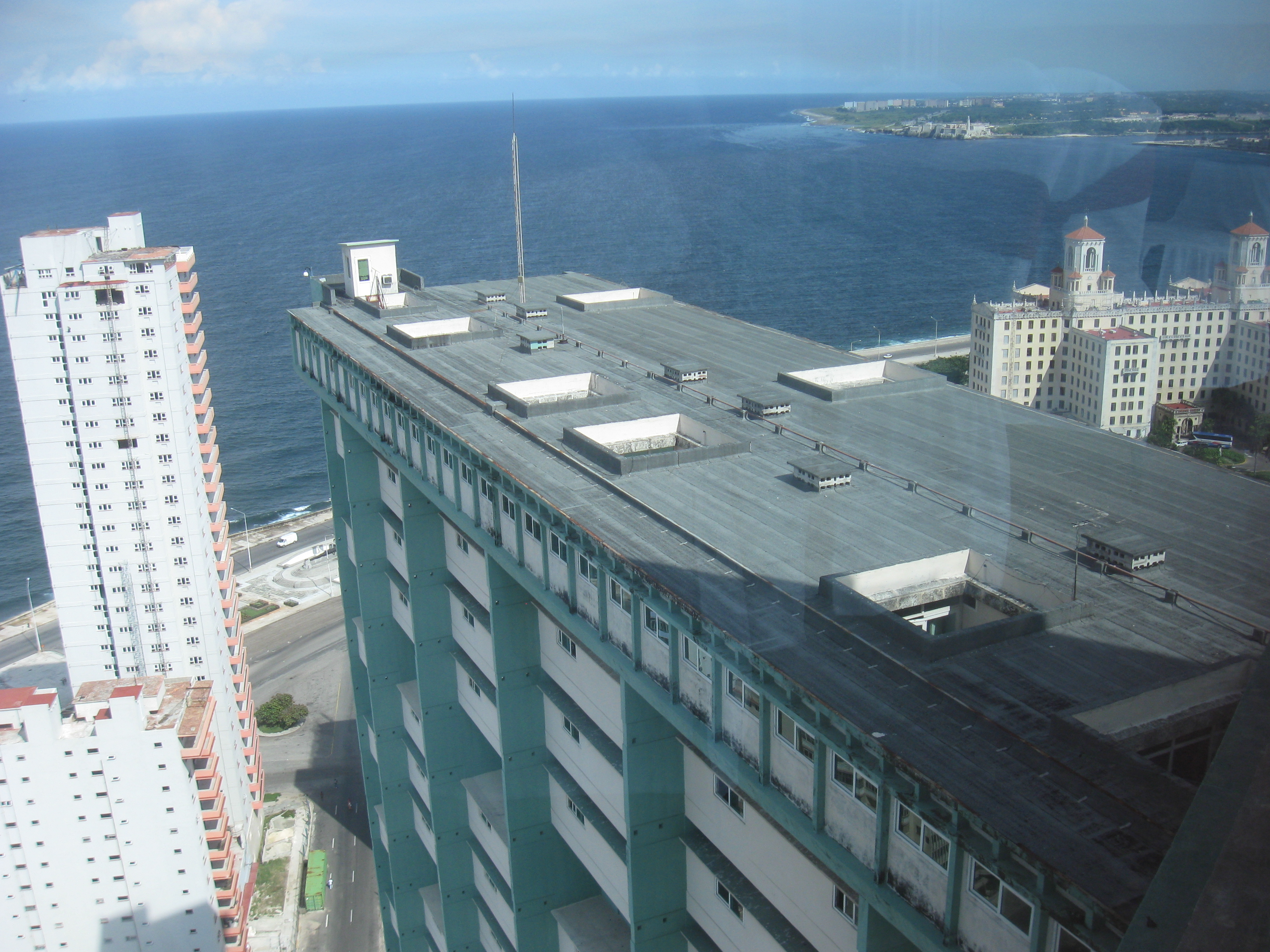 Havana. view from FOCSA.